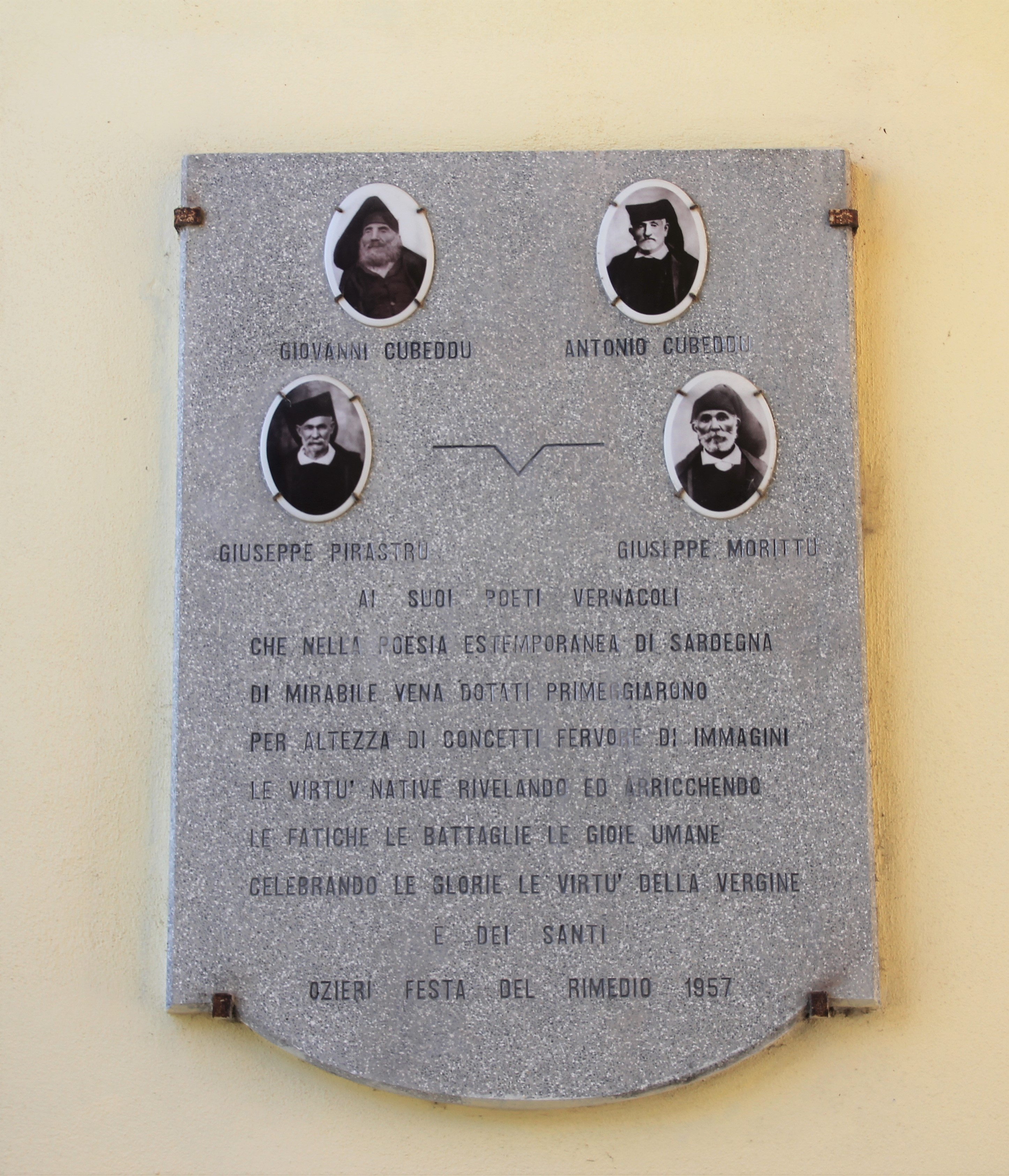 Ozieri, cimitero monumentale. Iscrizione del 1957 dedicata alla memoria di quattro poeti estemporanei sardi, i poetes Giovanni Cubeddu, Antonio Cubeddu, Giuseppe Pirastru, Giuseppe Morittu. Il testo dell'iscrizione così recita: "Ai suoi poeti vernacoliche nella poesia estemporanea di Sardegnadi mirabile vena dotati primeggiaronoper altezza di concetti fervore di immaginile virtù native rivelando ed arricchendole fatiche le battaglie le gioie umanecelebrando le glorie le virtù della Vergine e dei santiOzieri, Festa del rimedio 1957"